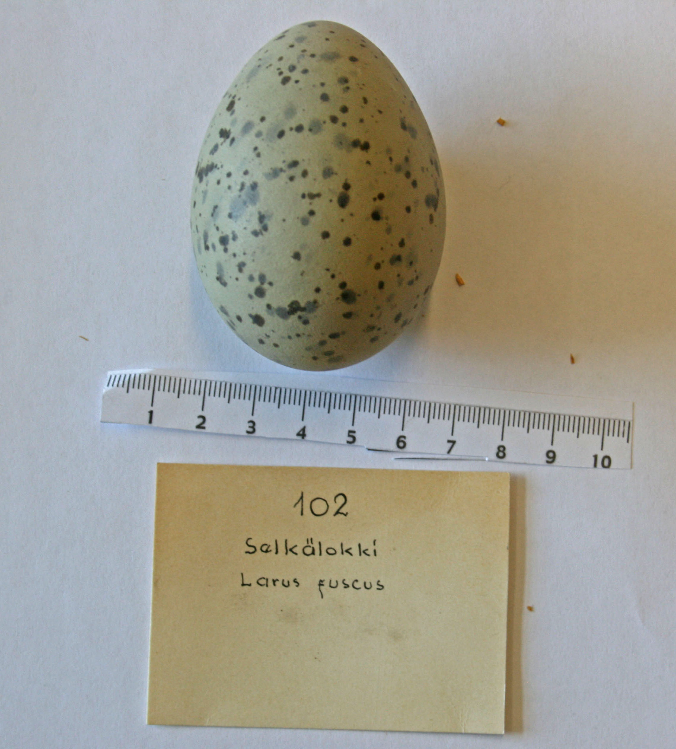 Selkälokin muna. V. Vuorisalon ja Y. Karran kokoelmasta. lahjoitettu 2.1.1947 Kokemäen Yhteiskoululle. munat poimittu Utö 10.6.1925